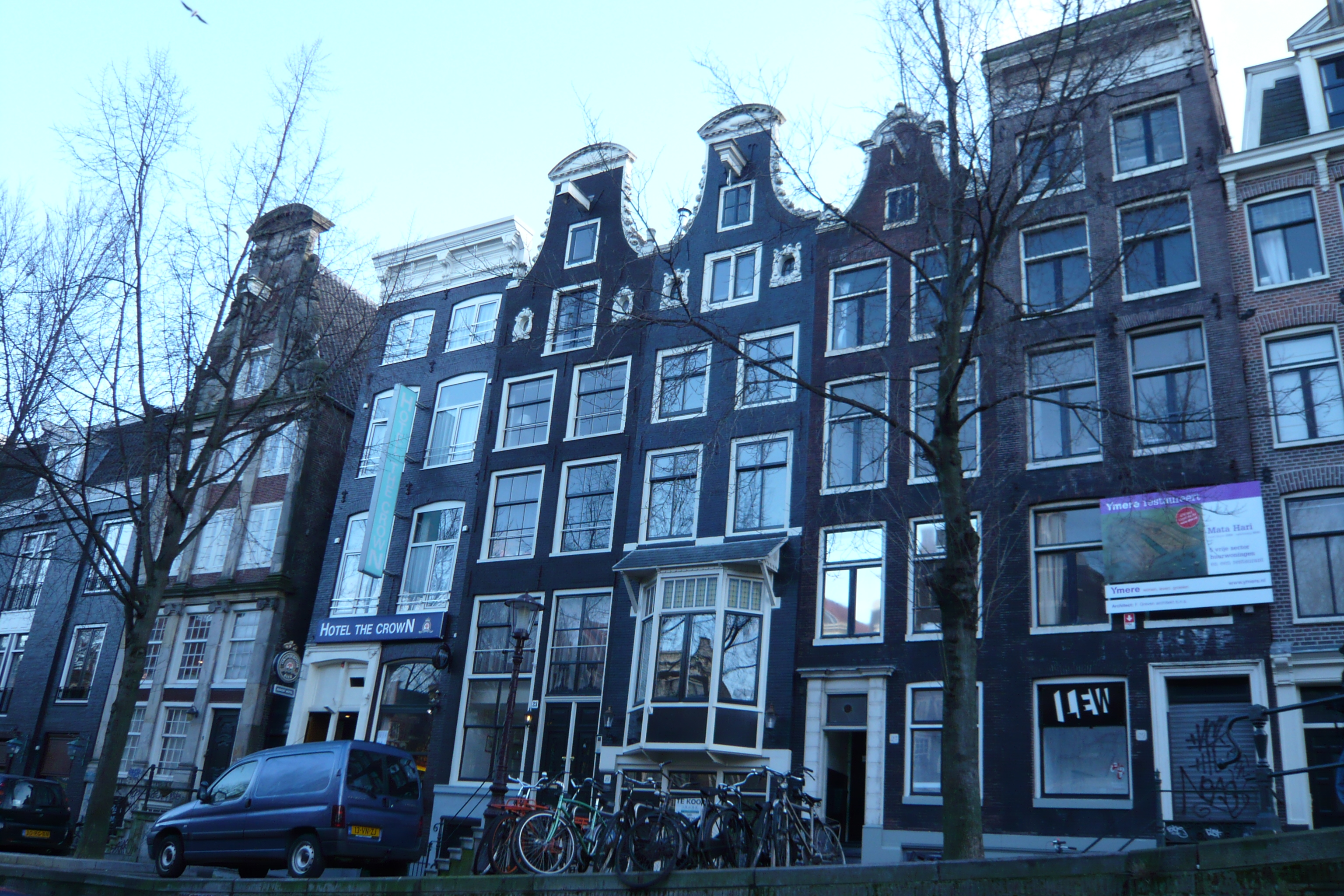 Oudezijds Voorburgwal 19,21,23,25,27 Amsterdam.